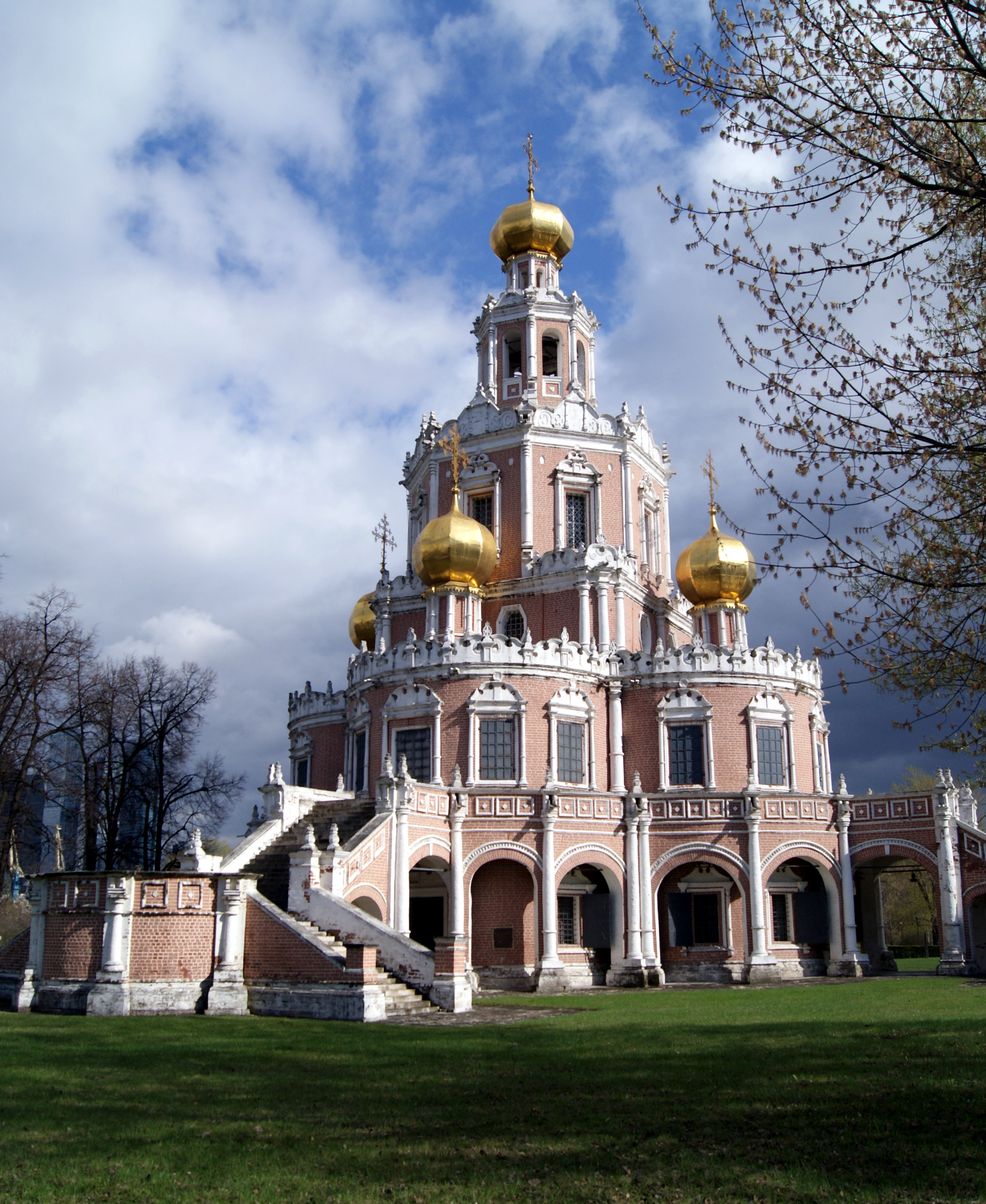 Built in 1694